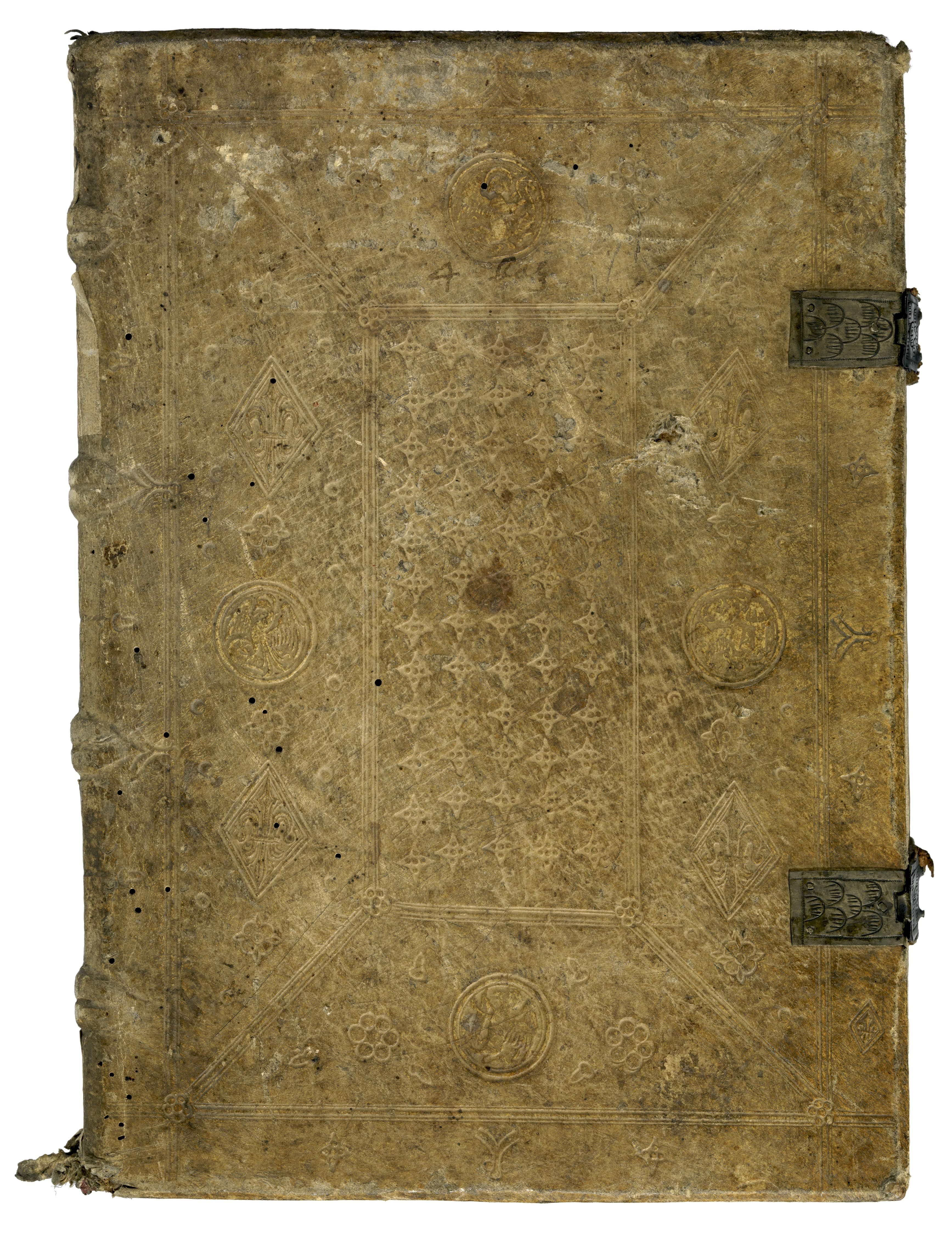 Vorderer Einbanddeckel von Johannes Richenbach des Sammelbands: (1) Jacobus de Clusa: Sermones dominicales. Speyer: Peter Drach, 1477. ISTC (2) Viola sanctorum. Basel: Bernhard Richel, 1474. ISTC Staatsbibliothek Bamberg, Signatur: Inc.typ.Q.XI.25